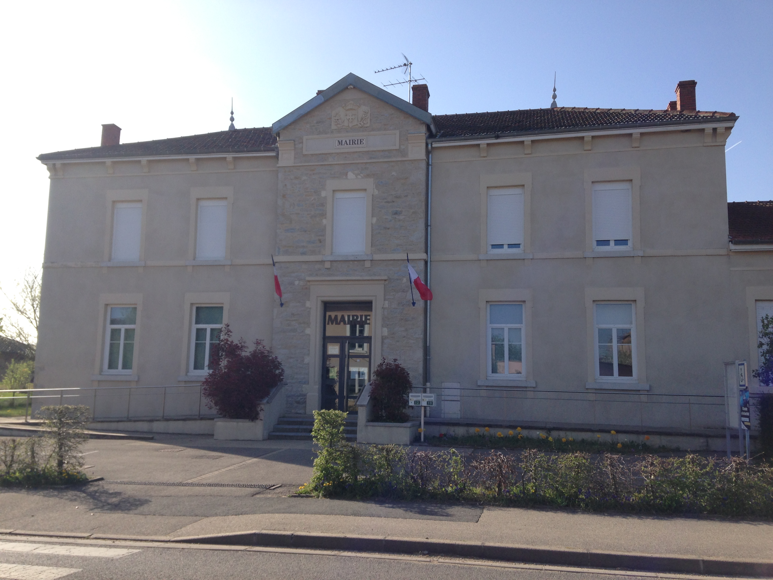 Mairie de Saint-Didier-d'Aussiat